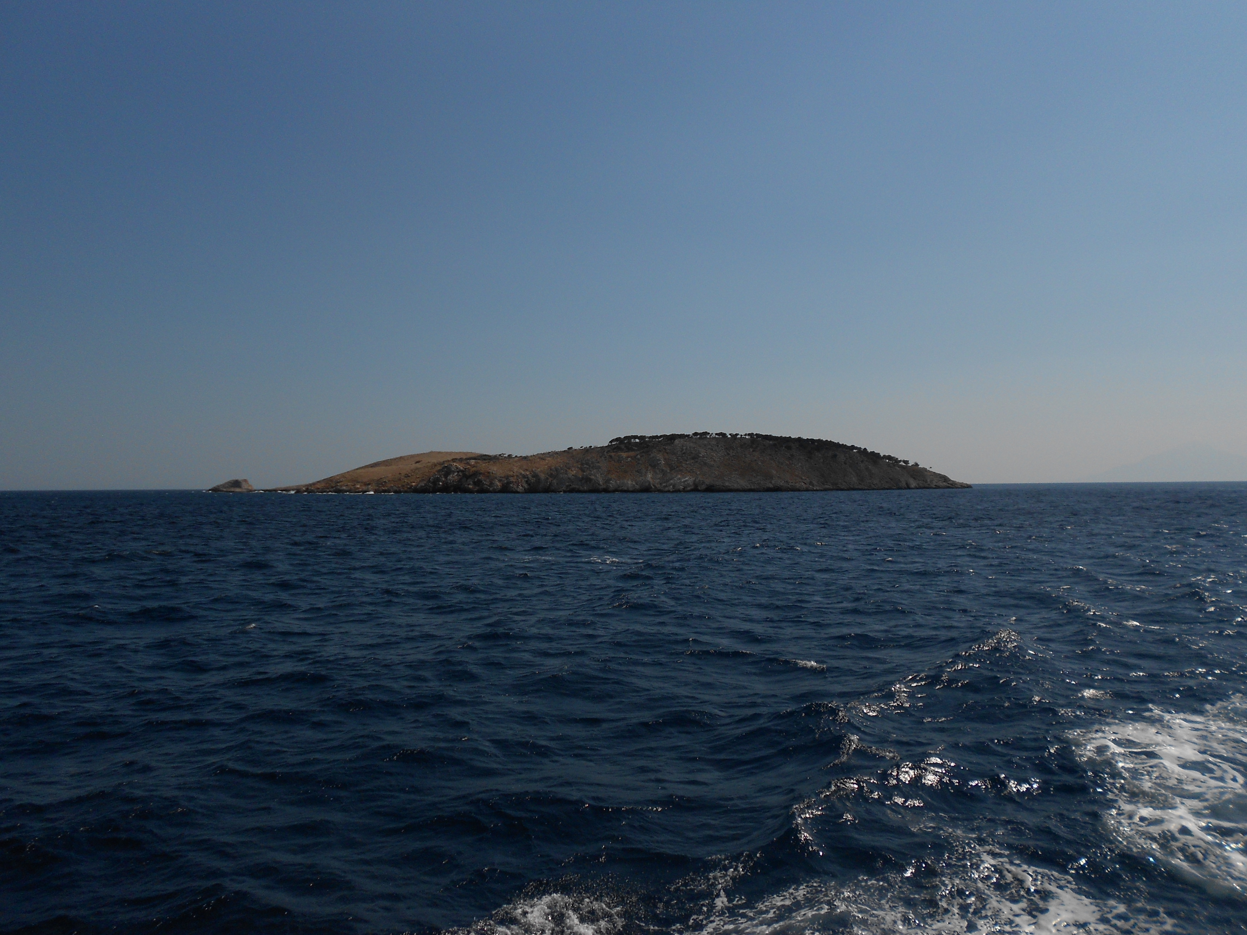 Драган Цветковић Ниш сопствена слика Острво Панагија поред Тасоса Грчка 2013 Licensing